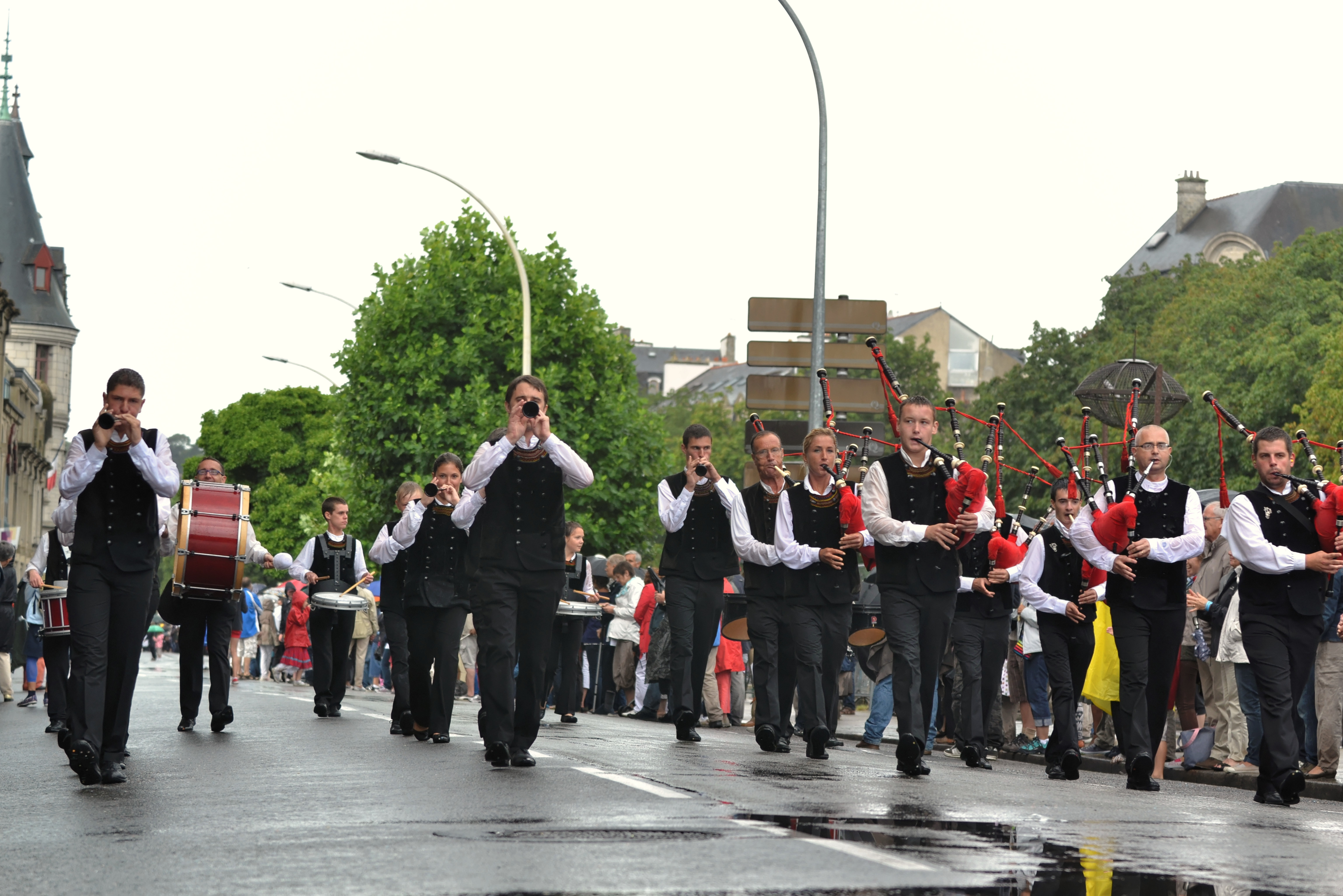 "Défilé en fête". Le Bagad Bro Foën (Fouesnant) lors du festival de Cornouaille 2013 le dimanche 28 juillet pour Kemper en Fête dans les rues de Quimper.